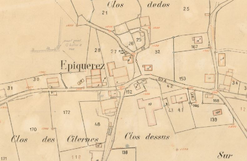 Extrait d'un plan historique d'Epiquerez, Archives cantonales jurassiennes